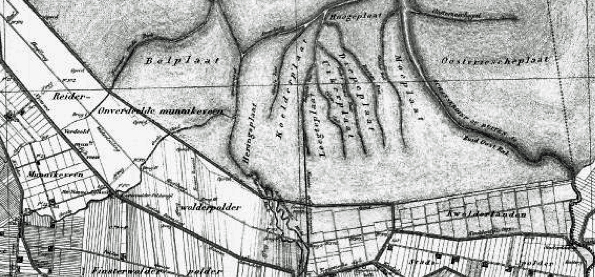 Reiderwolderpolder gedeeltelijk aangelegd, weergegeven op een kaart uit 1864